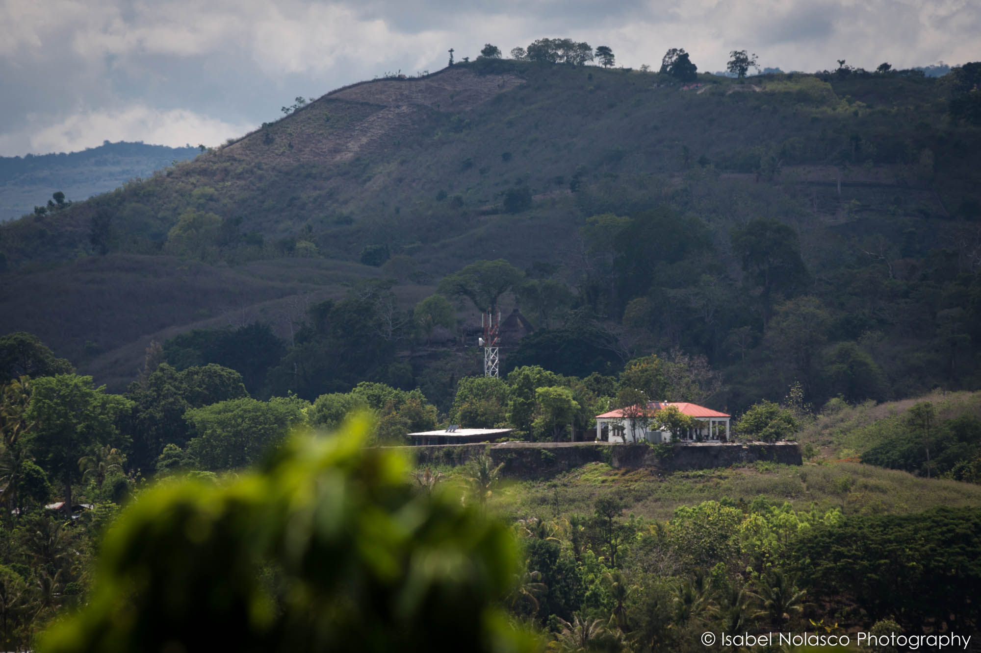 Fernansicht der Festung Balibo